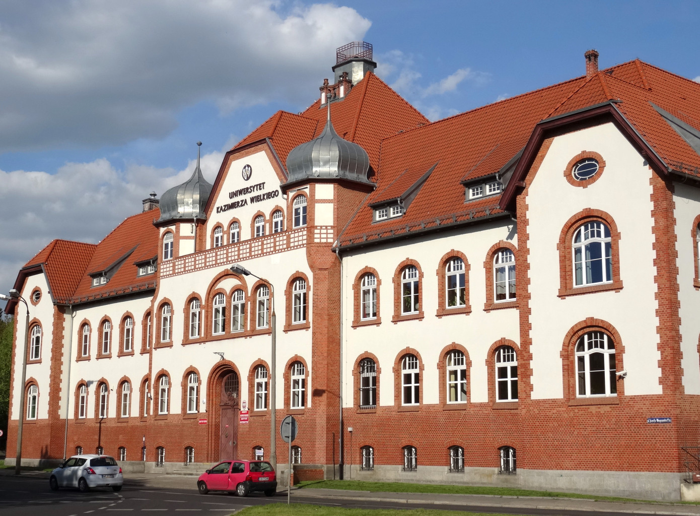 Dawne Instytuty Rolnicze w Bydgoszczy, budynek pl. Weyssenhoffa 11 w gestii Uniwersytetu Kazimierza Wielkiego